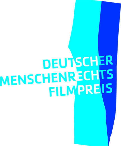 Logo des Deutschen Menschenrechts-Filmpreises